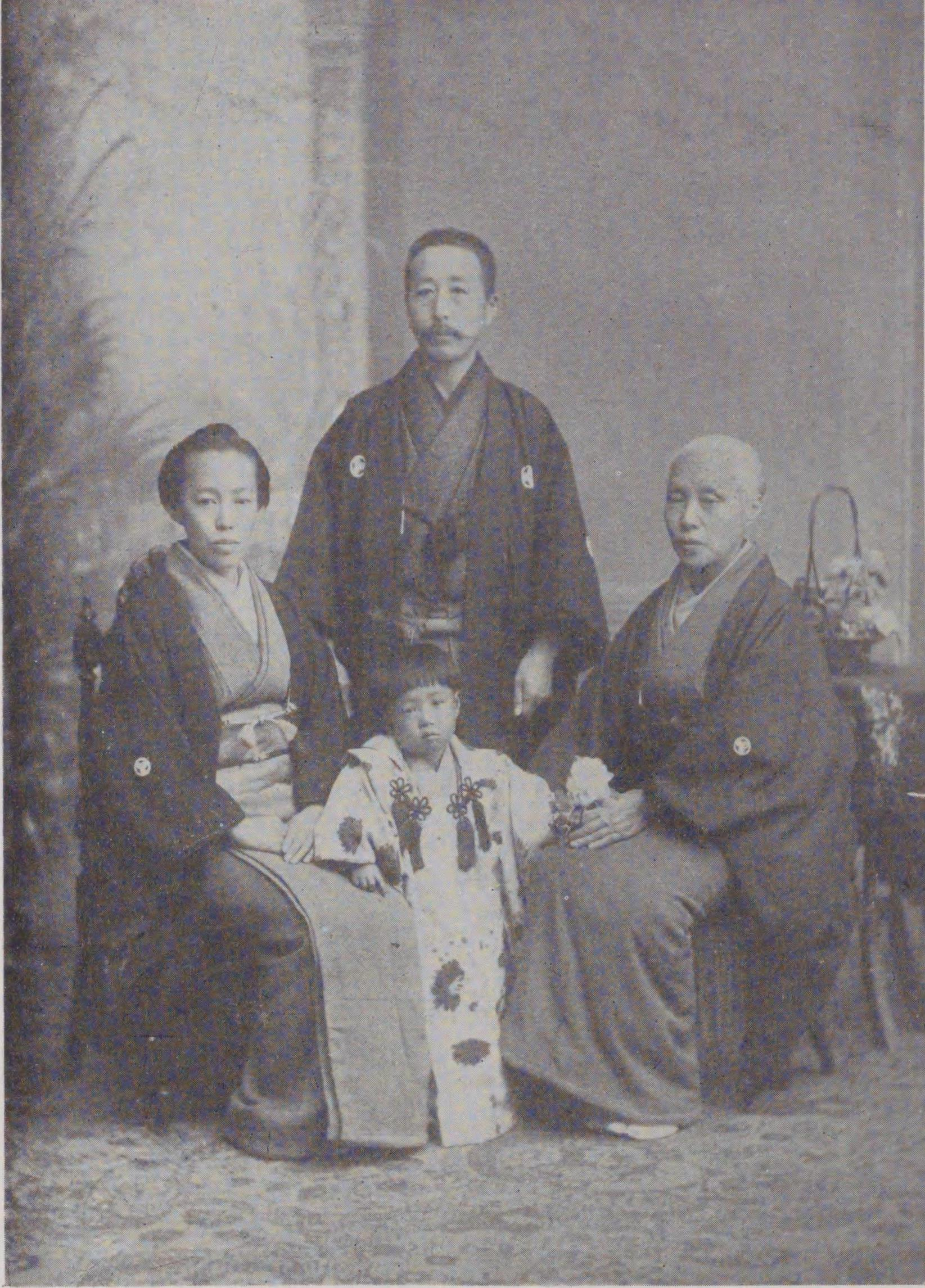 小鷹狩元凱と家族 中央元凱、前孫娘、右母、左妻